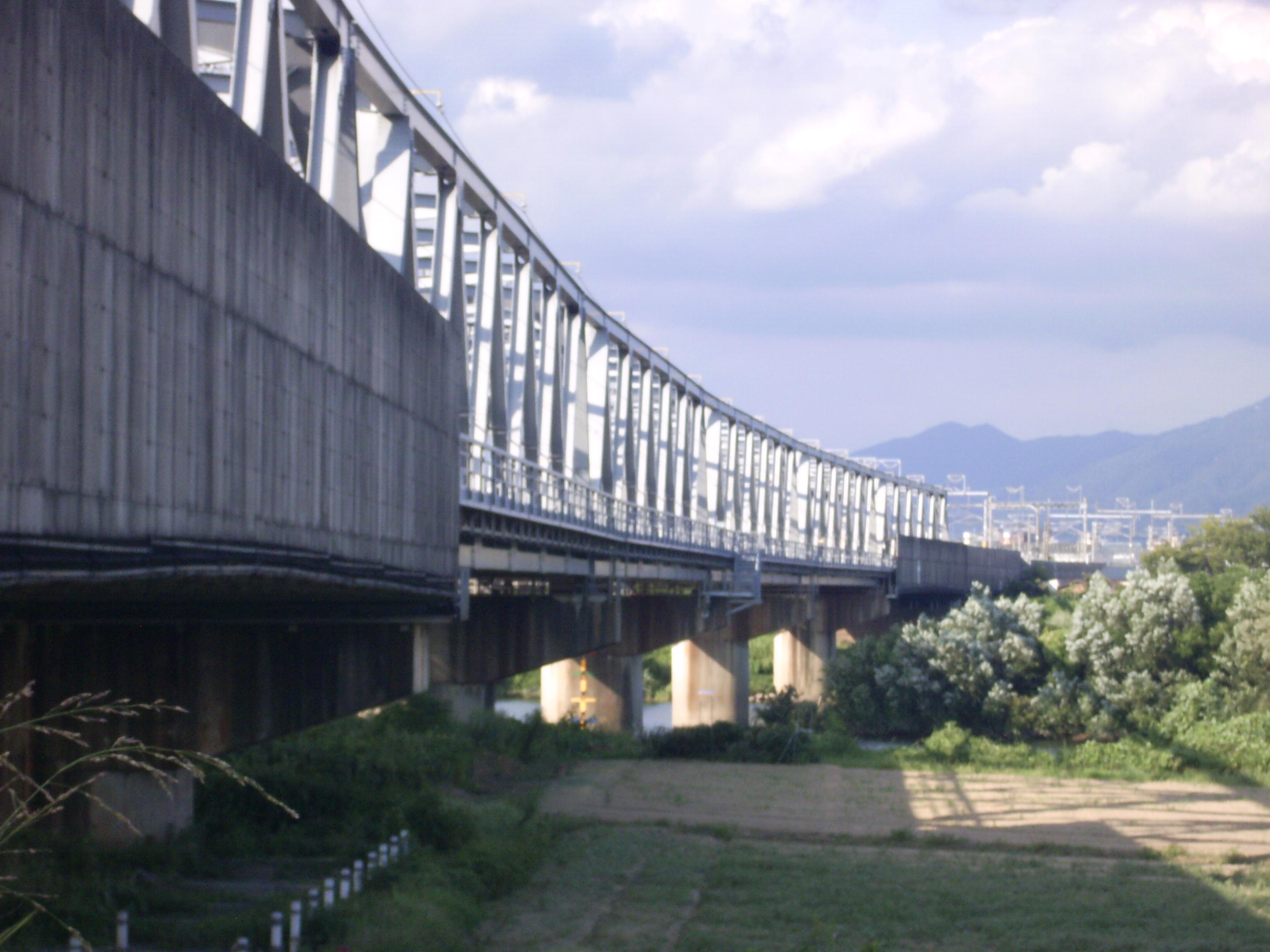 京都桂川に架かる東海道新幹線の桂川橋梁、鉄橋自体がカーブする珍しい構造 ㊟カメラを起動すると日付機能が出荷時のものに初期化されるため、ファイル履歴の撮影・投稿日時とメタデータの原画像データの生成日時が異なります